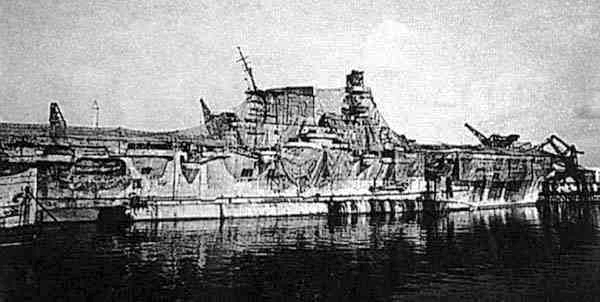 La portaerei Aquila ormeggiata nel porto di Genova coperta dai teli di mimetizzazione per cercare di sfuggire ai cacciabombardieri alleati